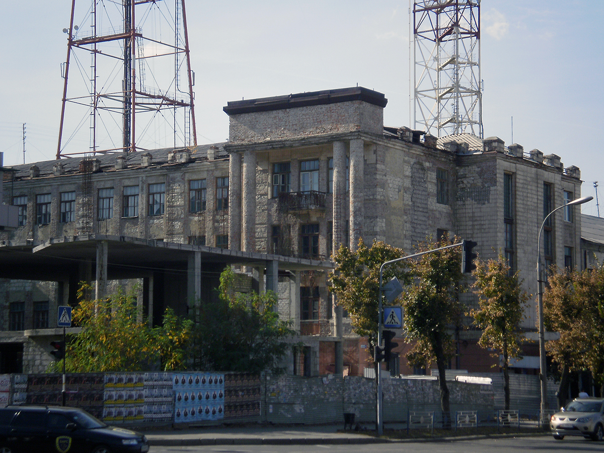 ЛОРТПК